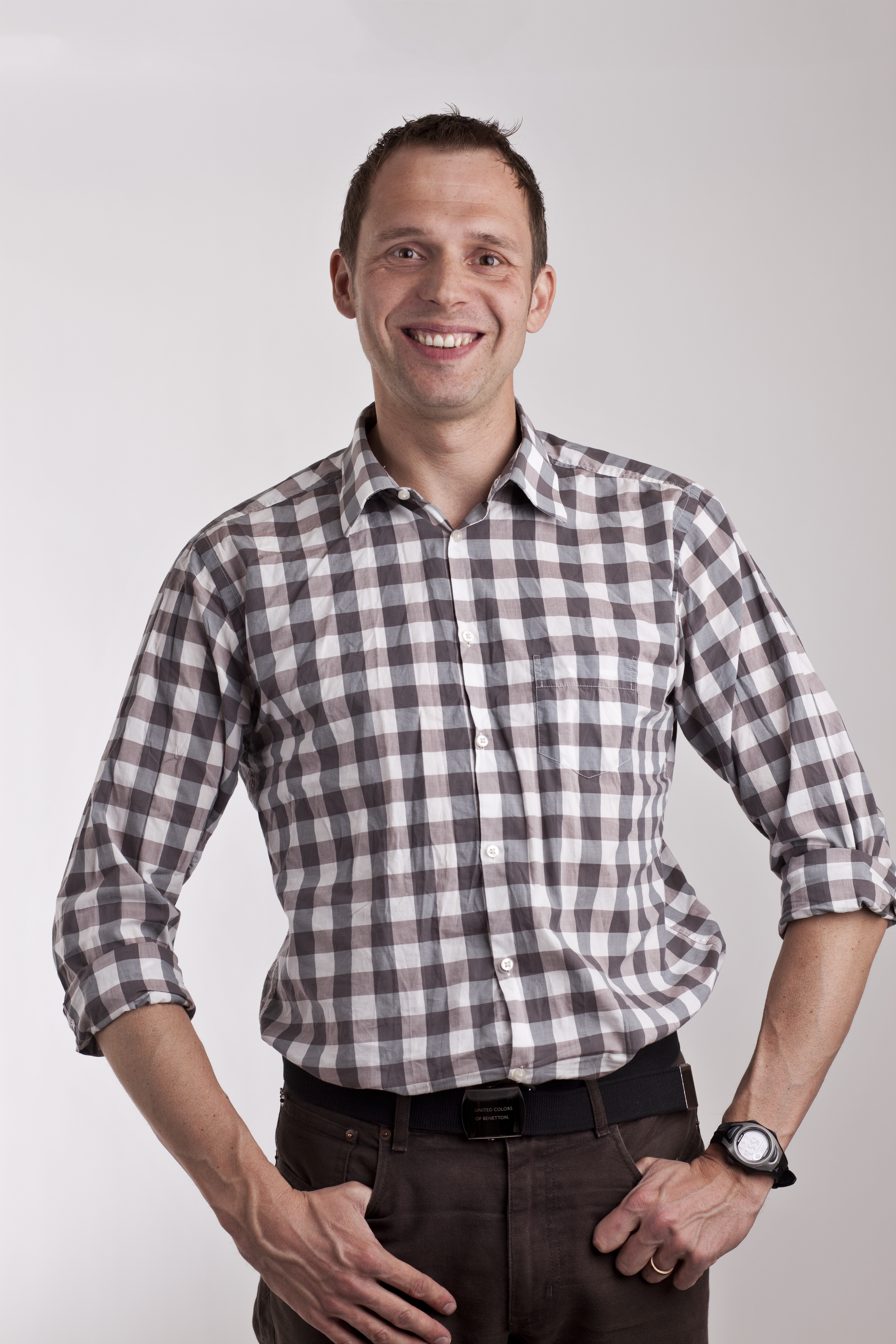 Jens Holm, Vänsterpartiet.